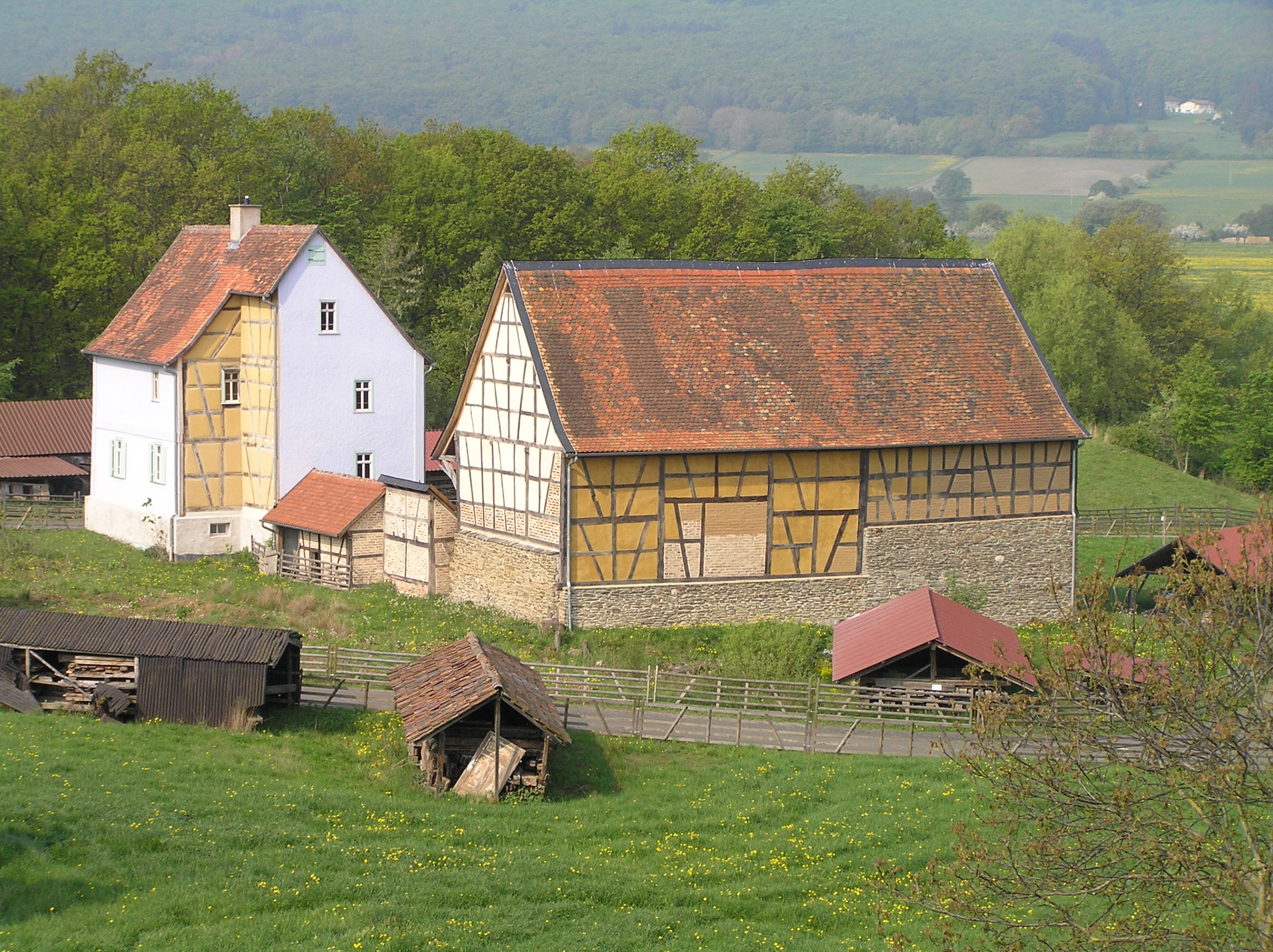 Hofreite Jäger im Hessenpark, Neu-Anspach, Rückseite vom Weinberg aus fotografiert